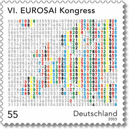 VI. EUROSAI Kongress, eine mit Zahlen visualisierte Europakarte